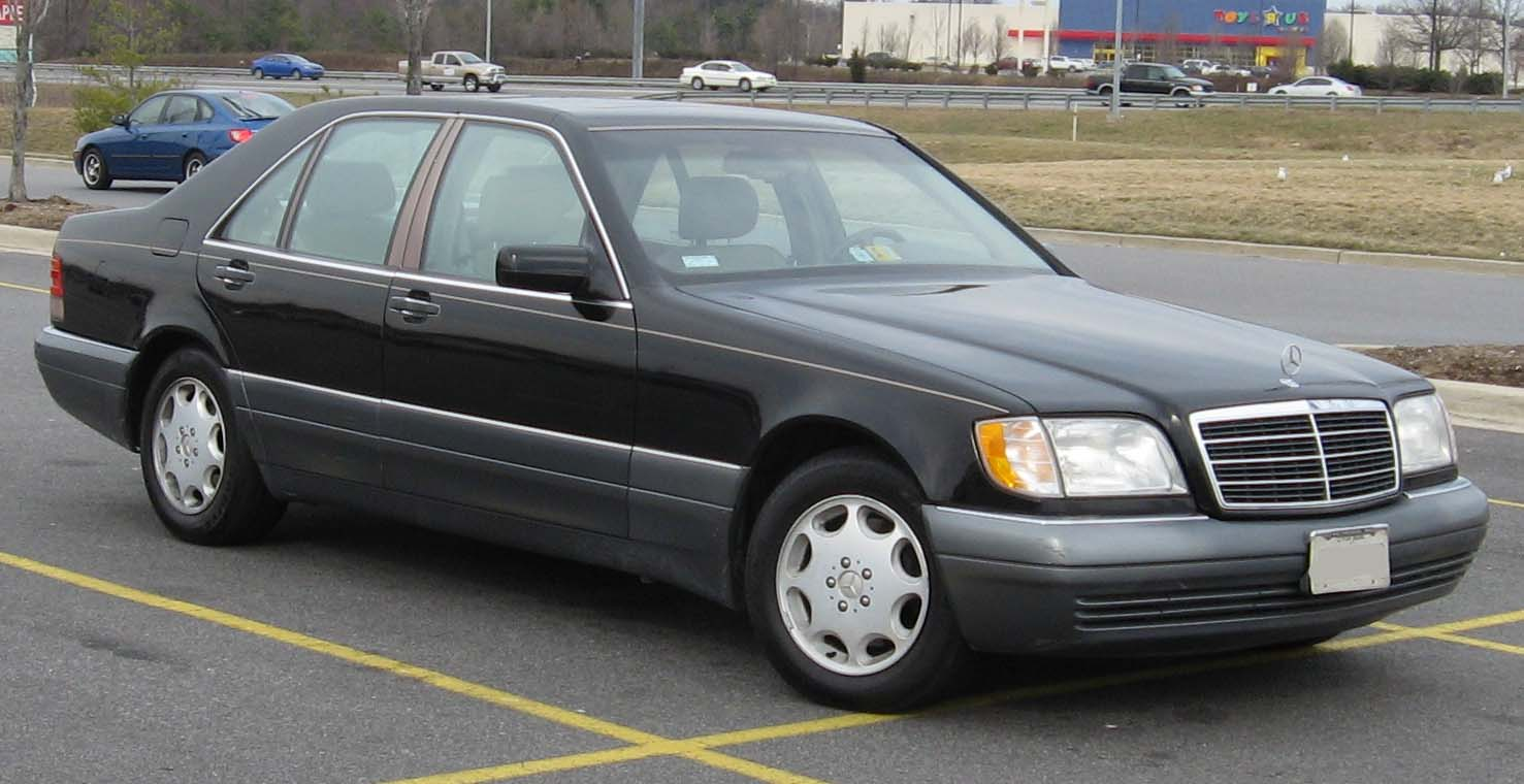 1995-1996 Mercedes-Benz S-Class SWB fotografiert in den USA.